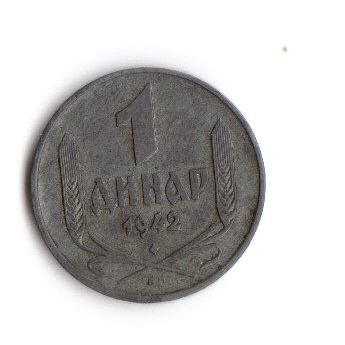 1 dinar serbo di zinco, 1942.